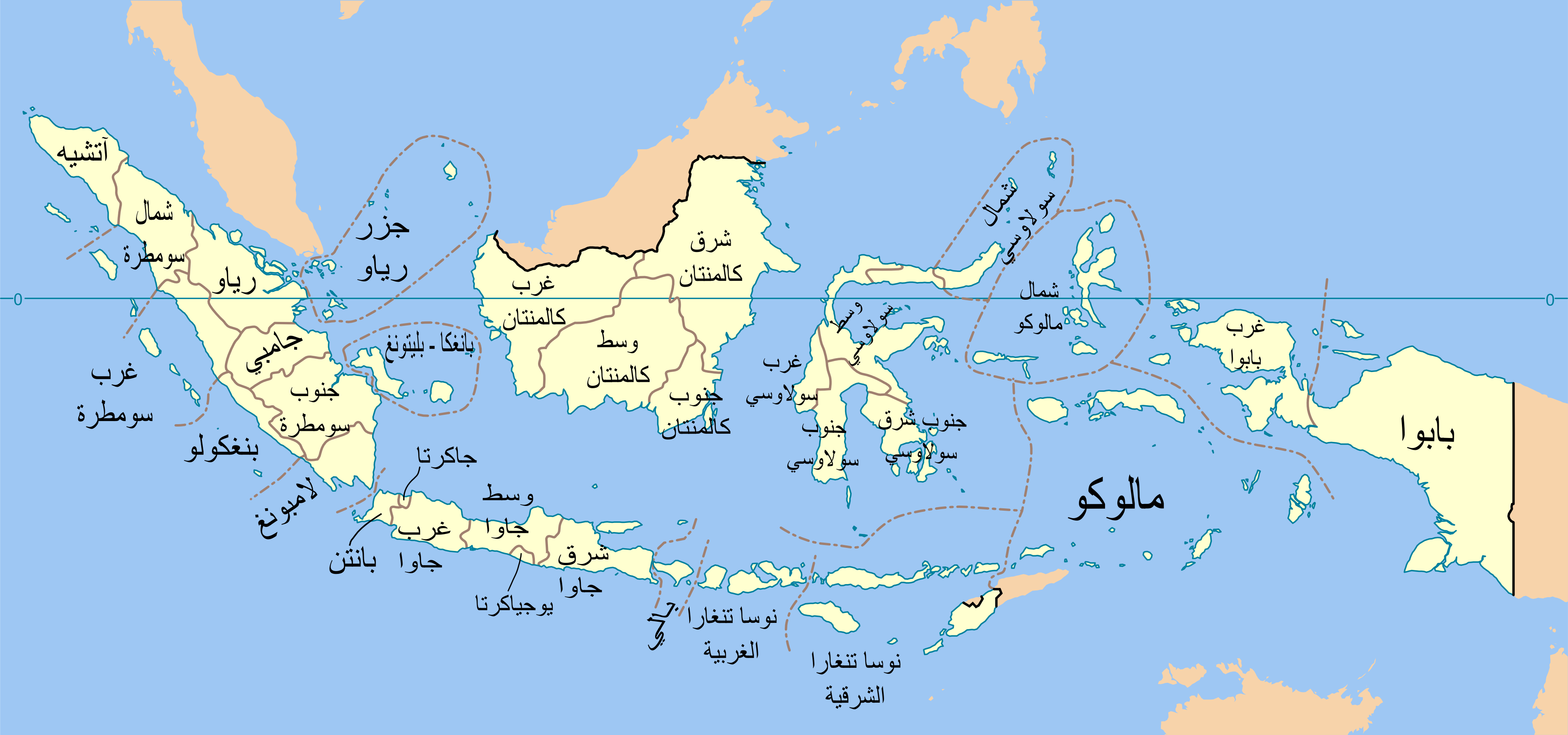 Indonesia provinces map in Indonesian